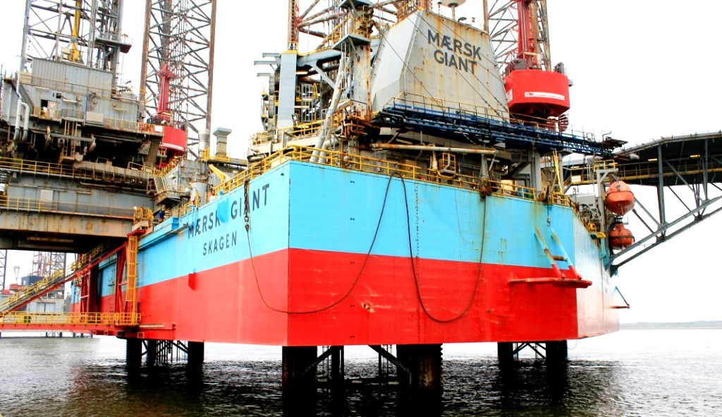 Die Maersk Giant in Esbjerg